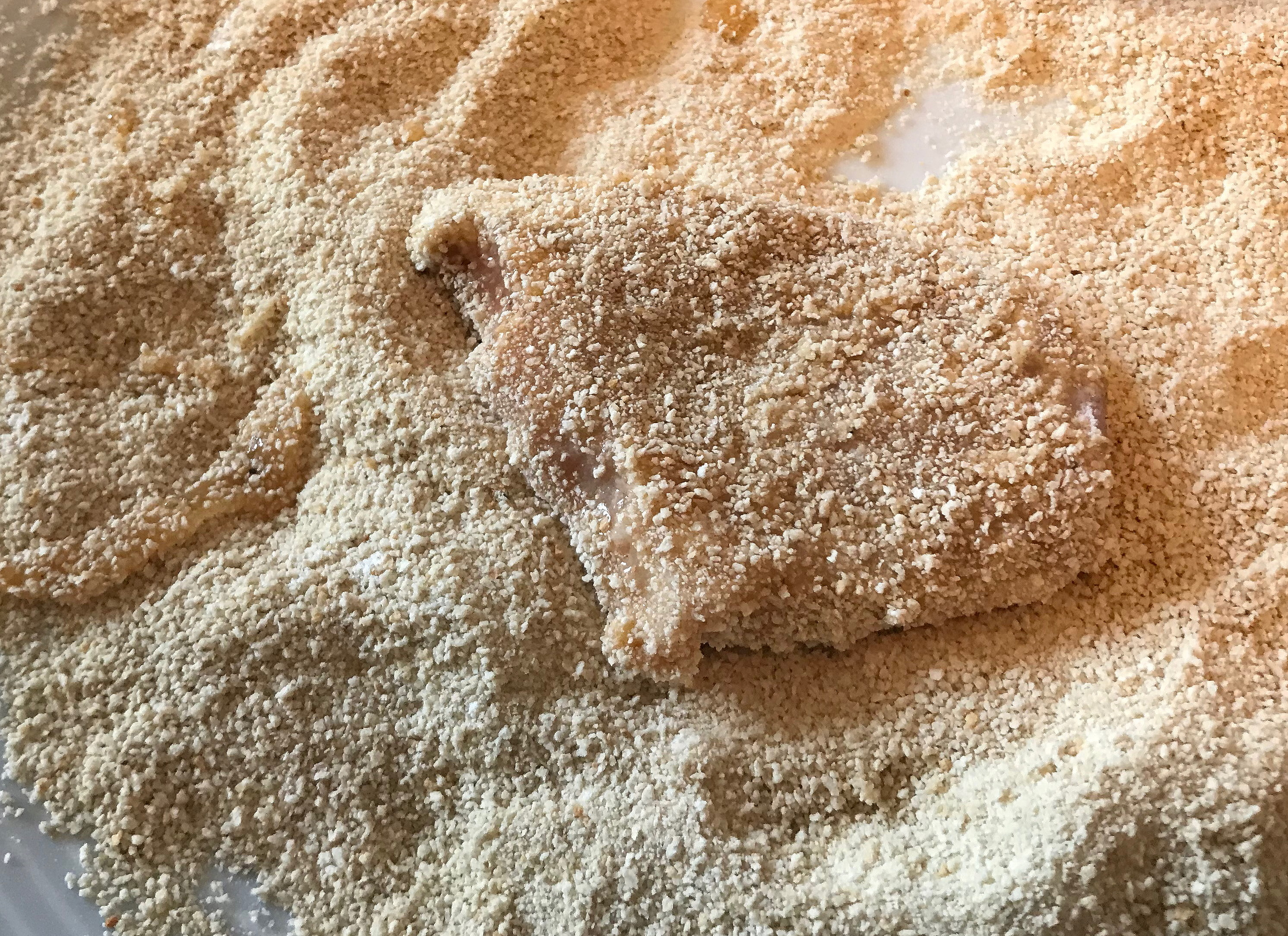 Schnitzelchen in Paniermehl